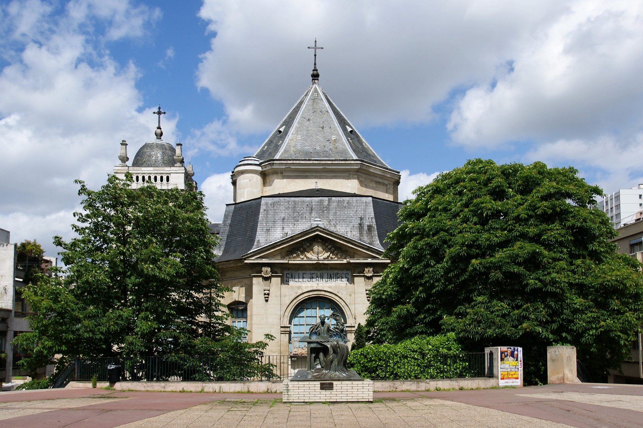 Eglise Saint Louis, vue de derrrière (Choisy Le Roi)